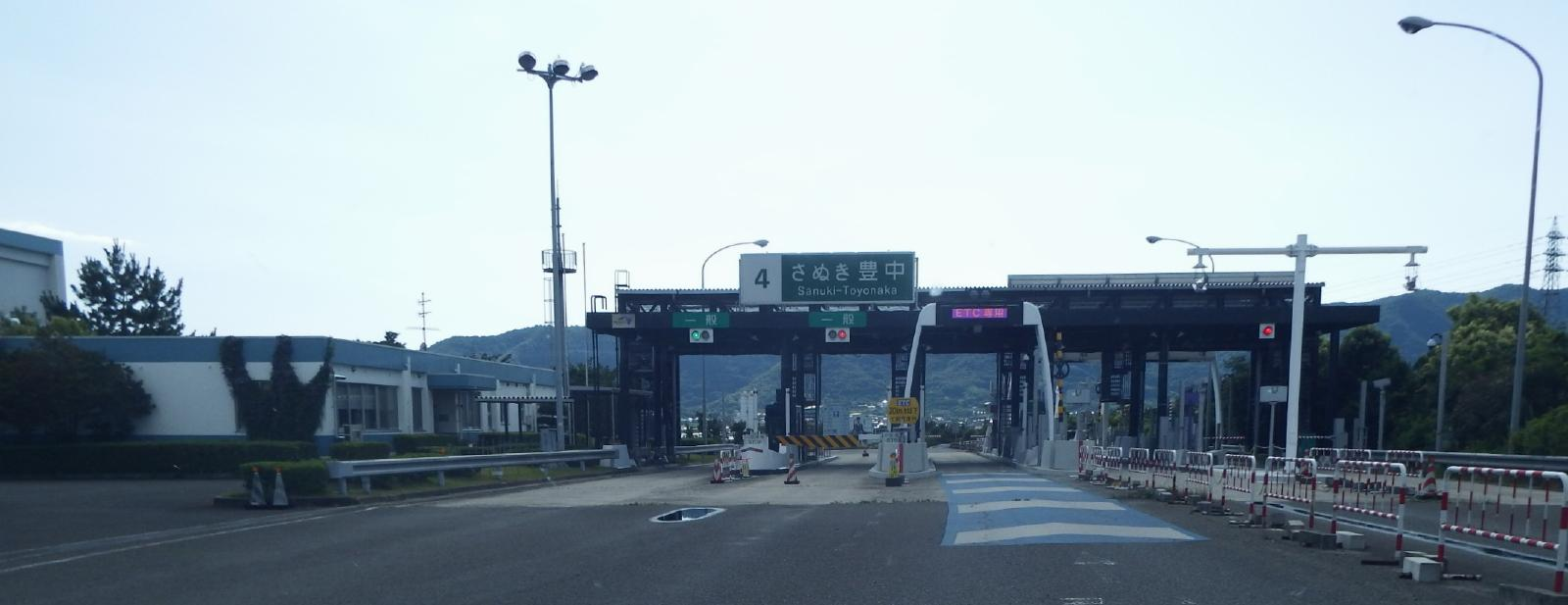 さぬき豊中インターチェンジの降り口